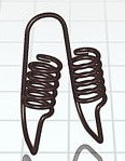 Dilatador Nasal Duo